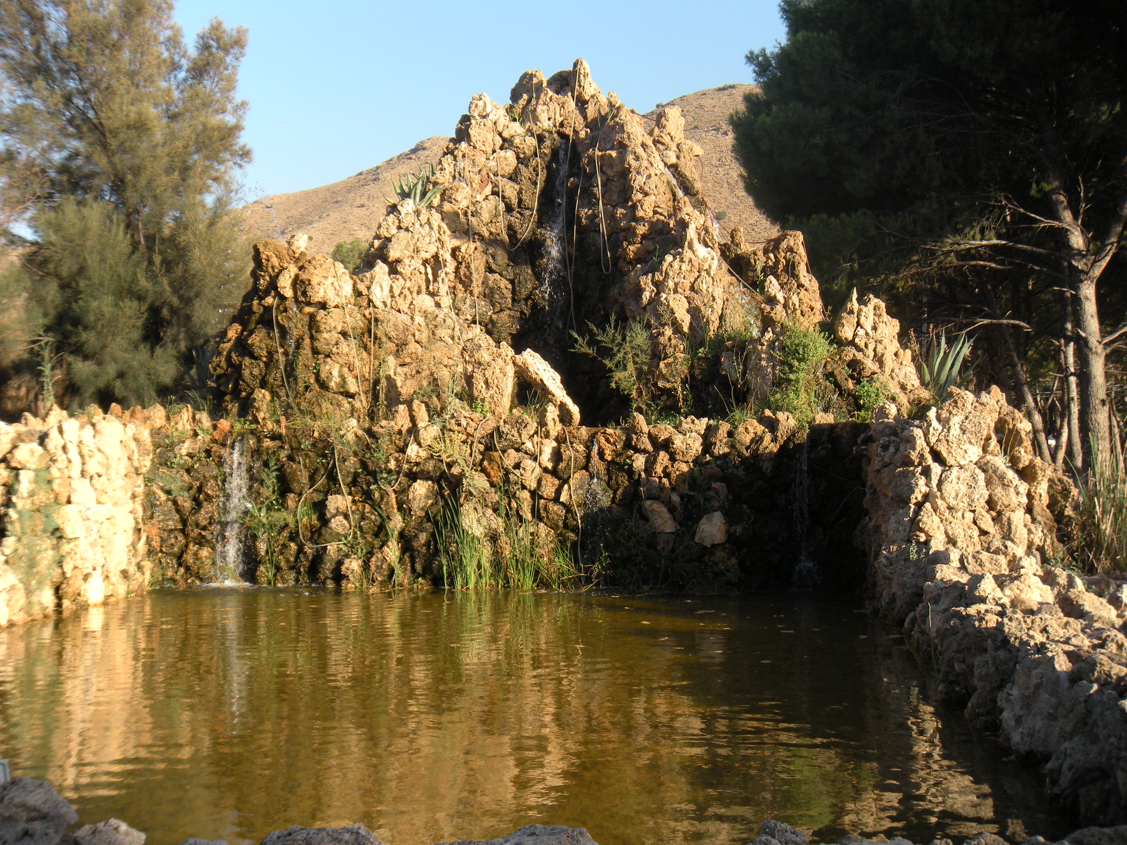 Fontaine d'eau en bassin dite magique au Lompi Family Park avec éclairage nocturne spécial à Djerma